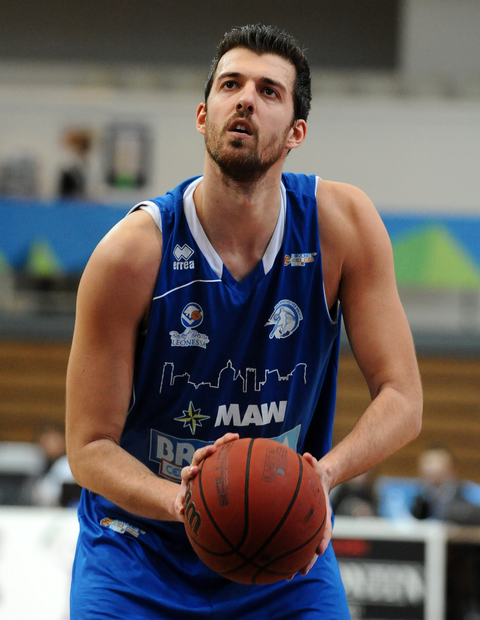 David Brkic al PalaTrento durante una partita contro l'Aquila Basket Trento.